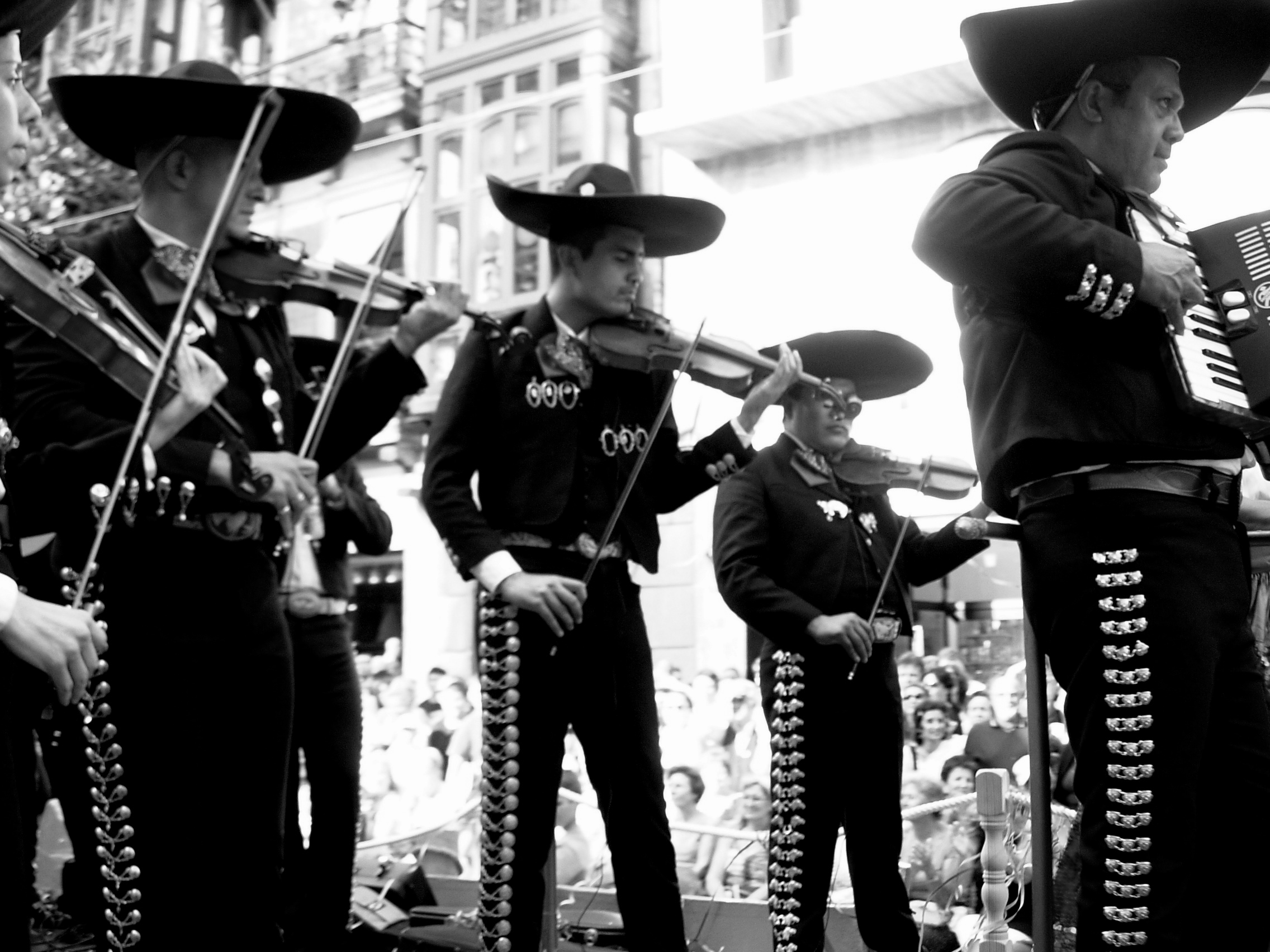 La carroza de México, con la música de Sonia Fausto y sus mariachis fue una de las ovacionadas de la tarde. Video 4